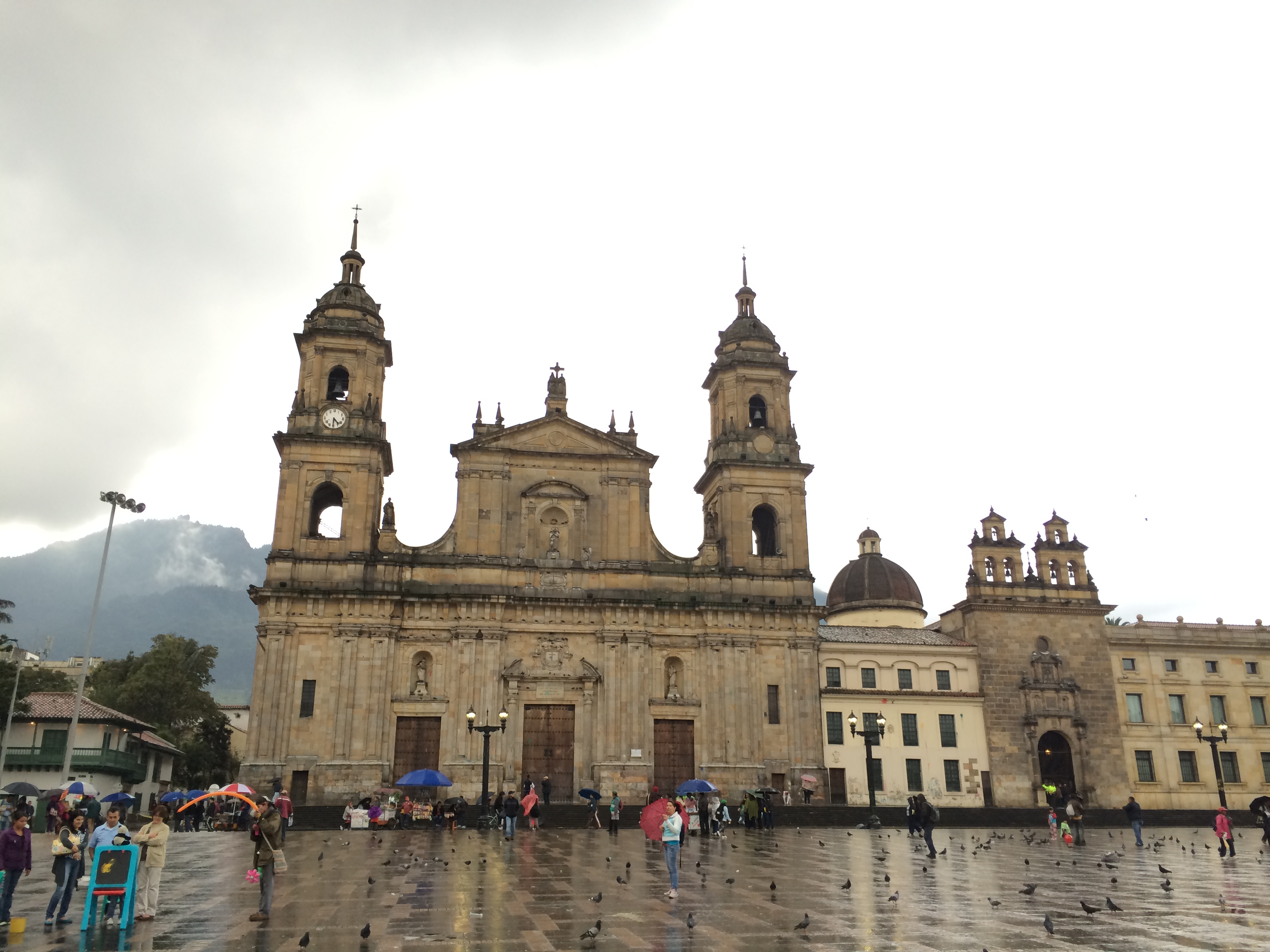 La Catedral, Bogotá, Bogota, Colombia